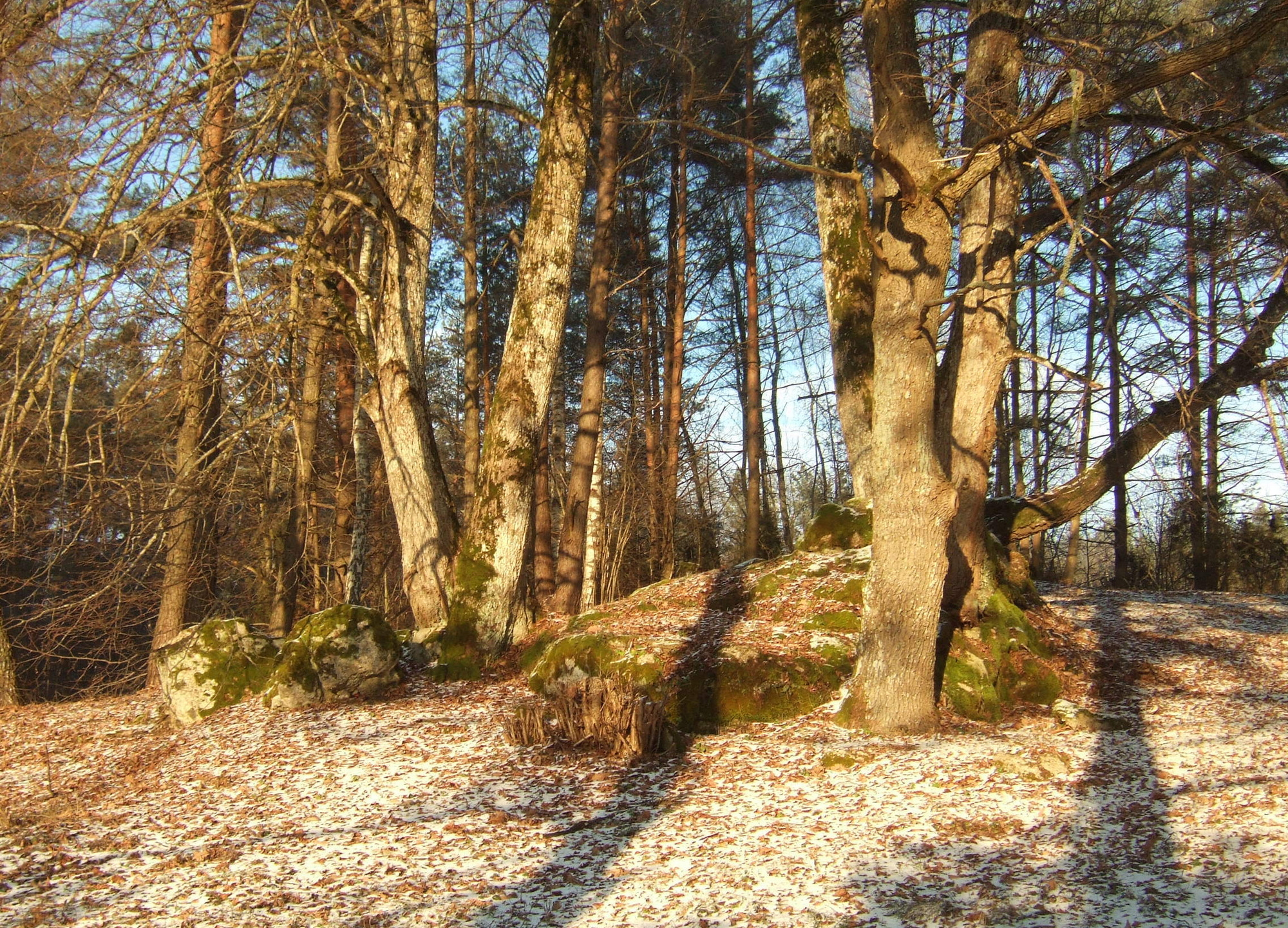 Stakų konglomerato luistai, ardomi ant jų augančių medžių.